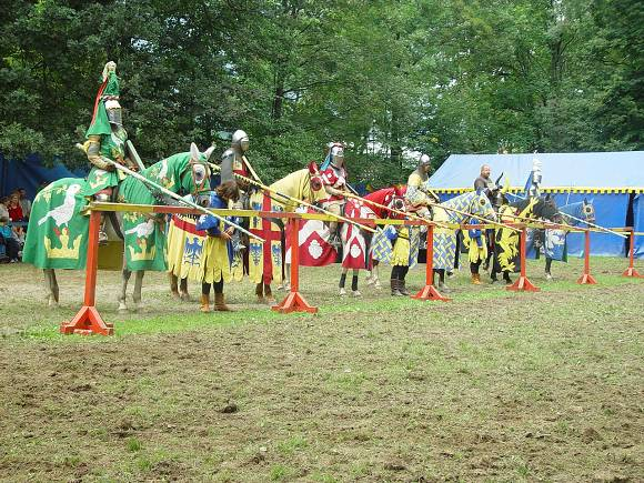 Rytíři skupiny Honoris.